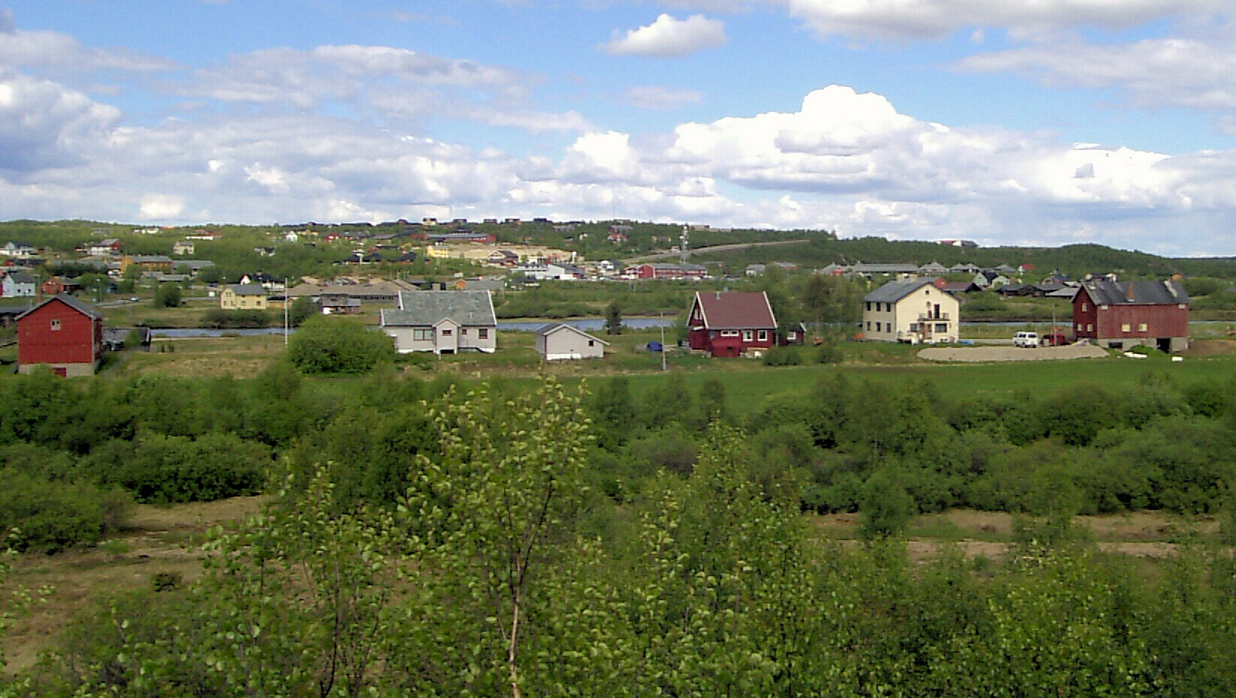 Davvisámegiella: Guovdageaidnu, Lápmi